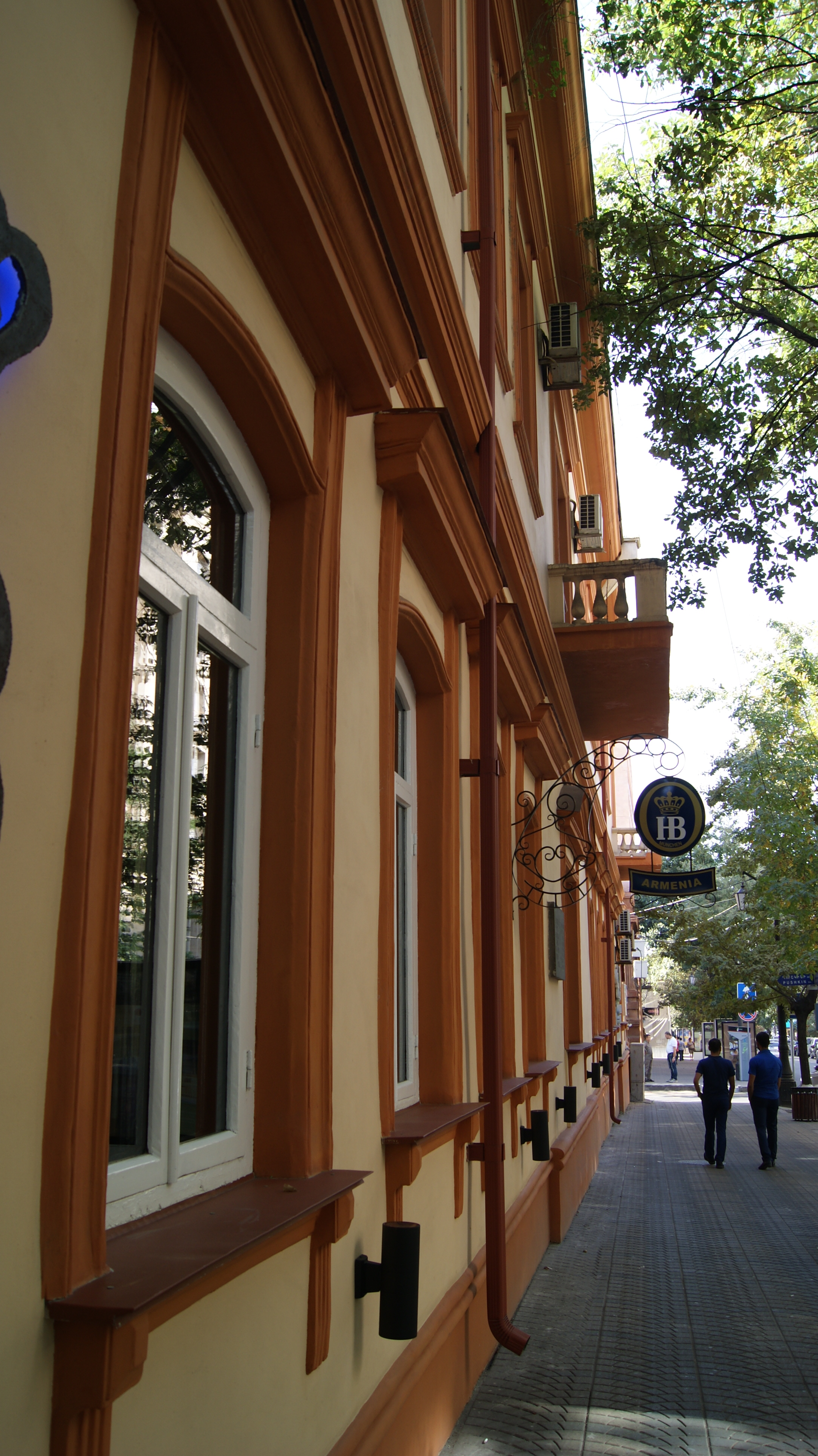 Բնակելի տուն Գրիգոր Ամիրյանի, Աբովյան փողոց 10 6/178.4.10